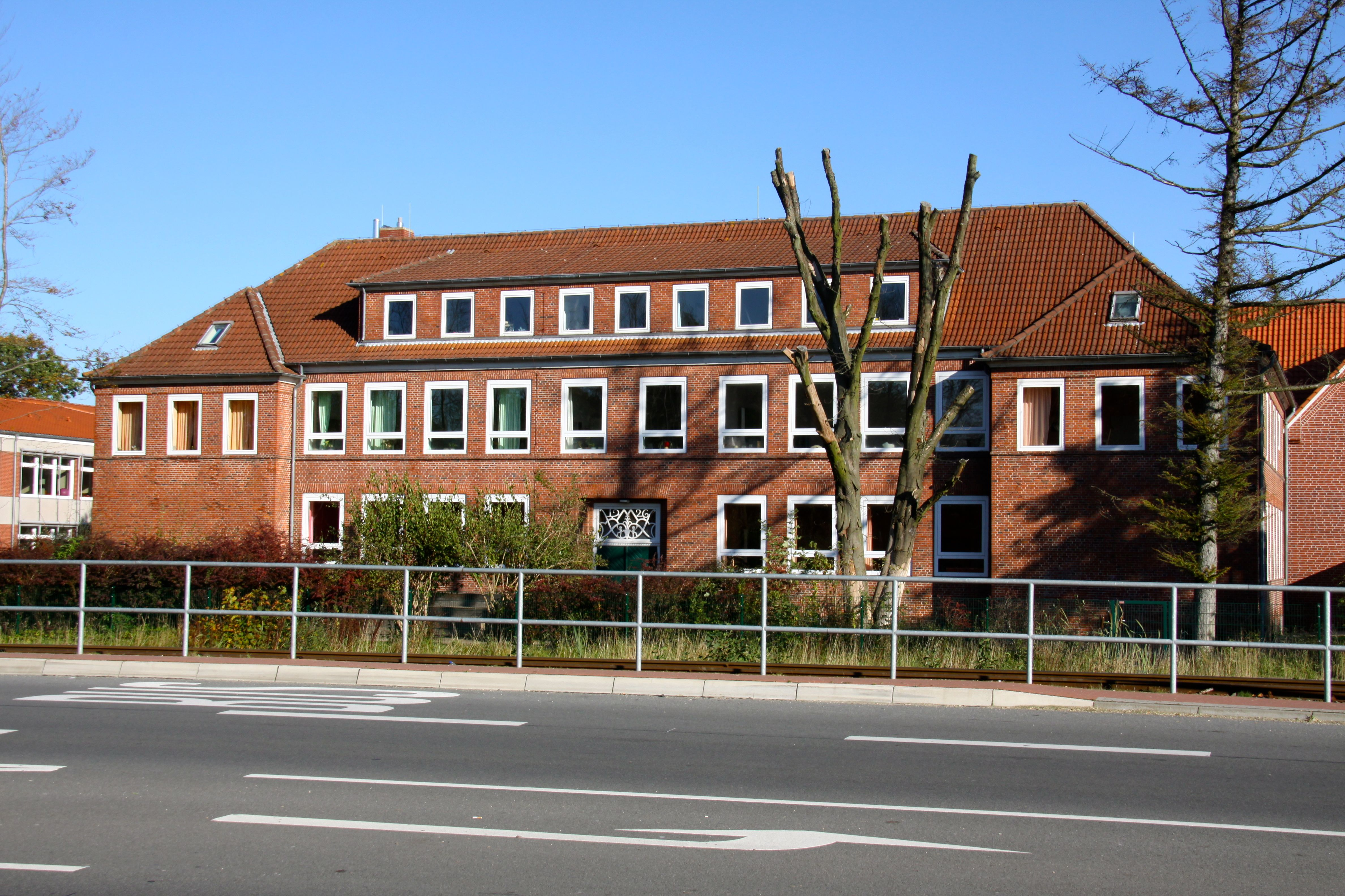 Waldorfschule